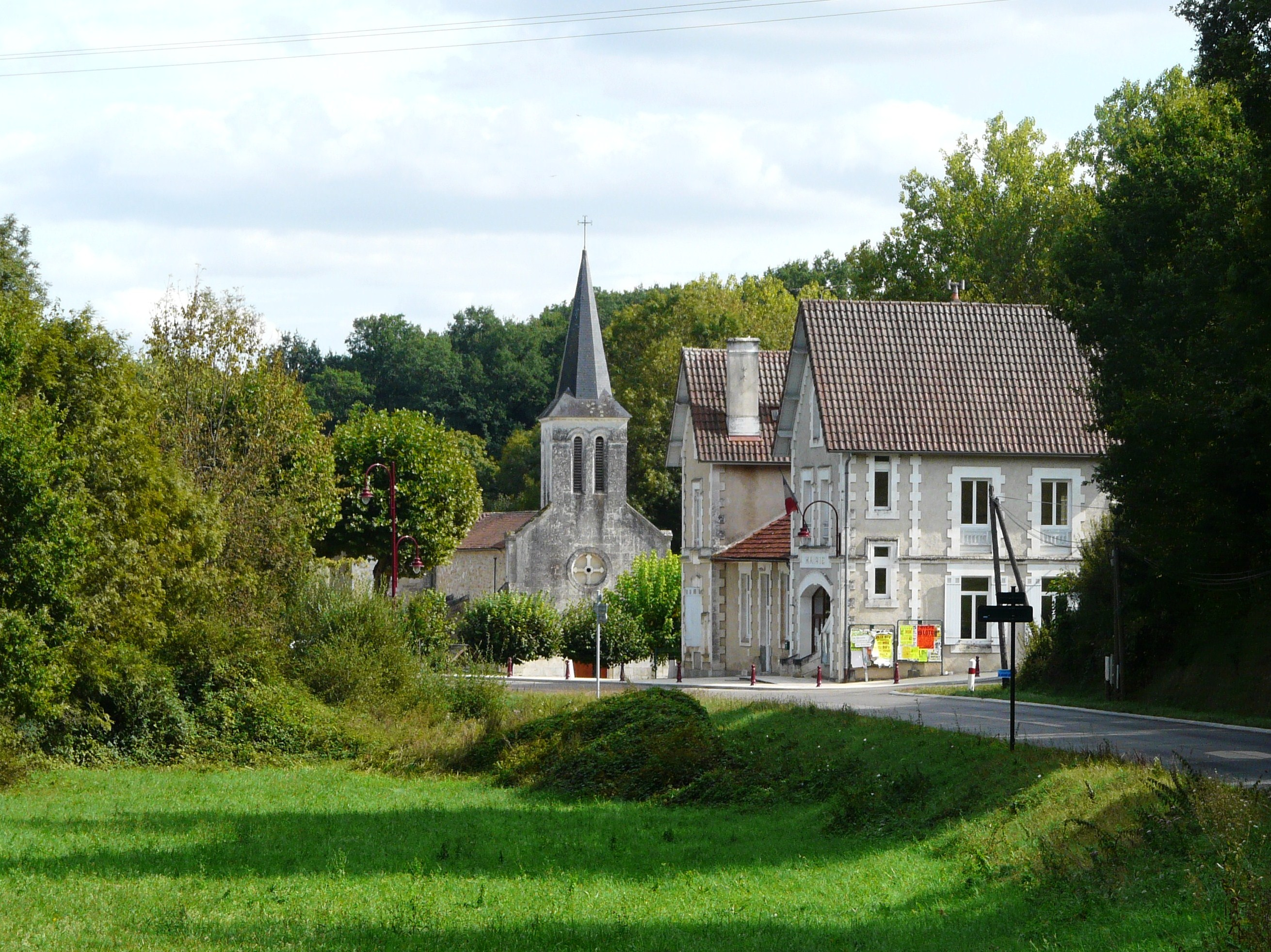 L'église et la mairie à l'entrée du bourg d'Eyzerac, Dordogne, France.